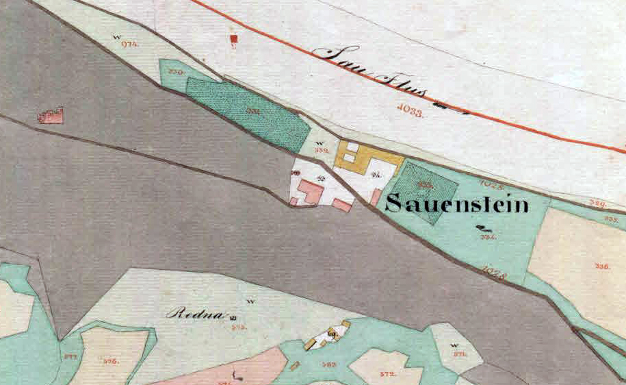 Franciscejski kataster za Kranjsko, 1823-1869